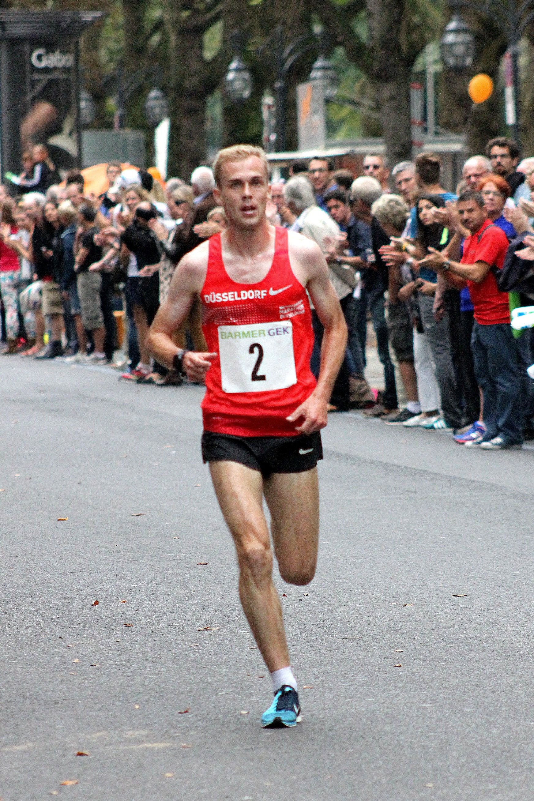 Kö-Lauf 2014, Deutsche Straßenlaufmeisterschaften 10 km